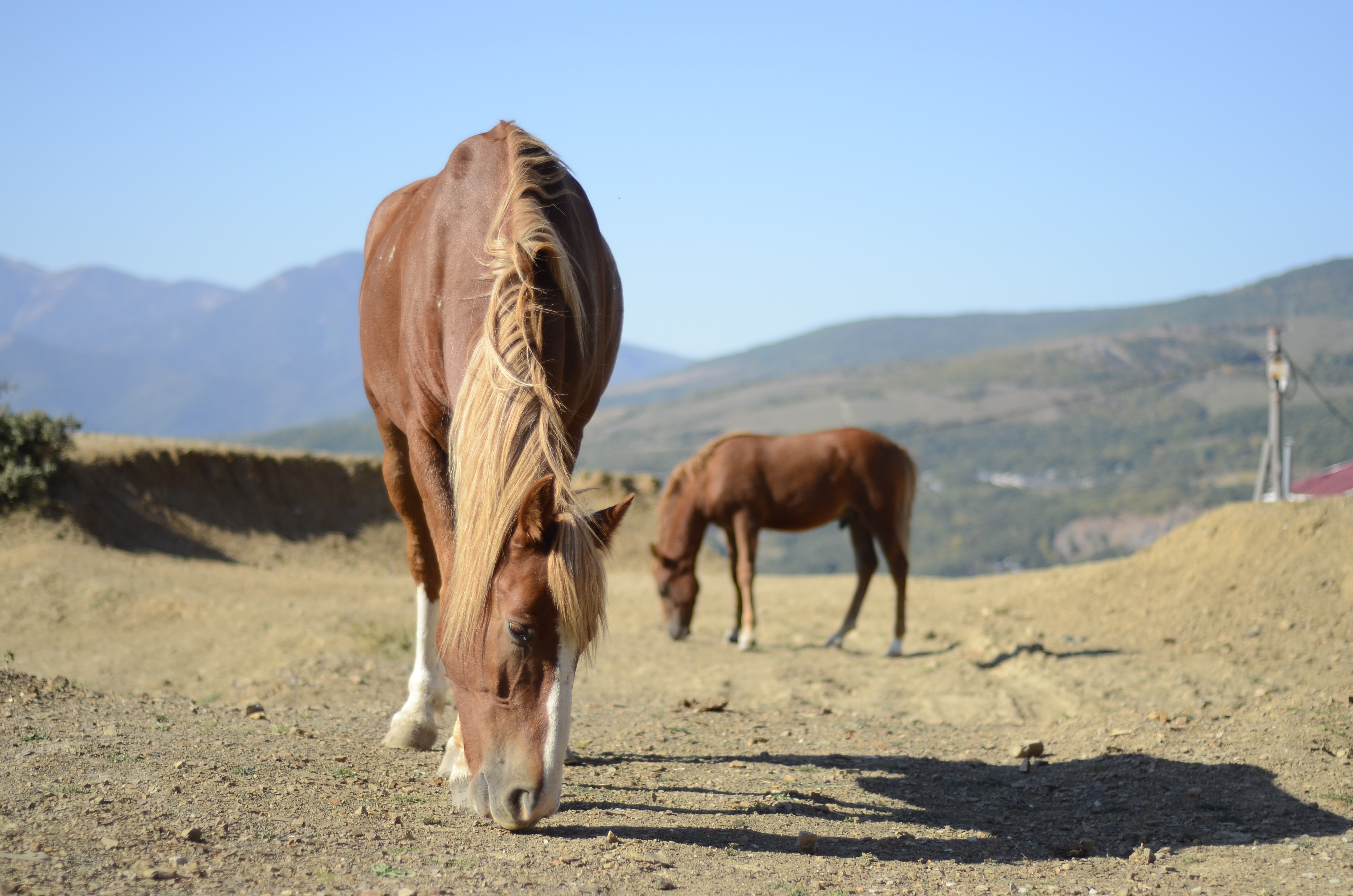 Лошади на Демерджи